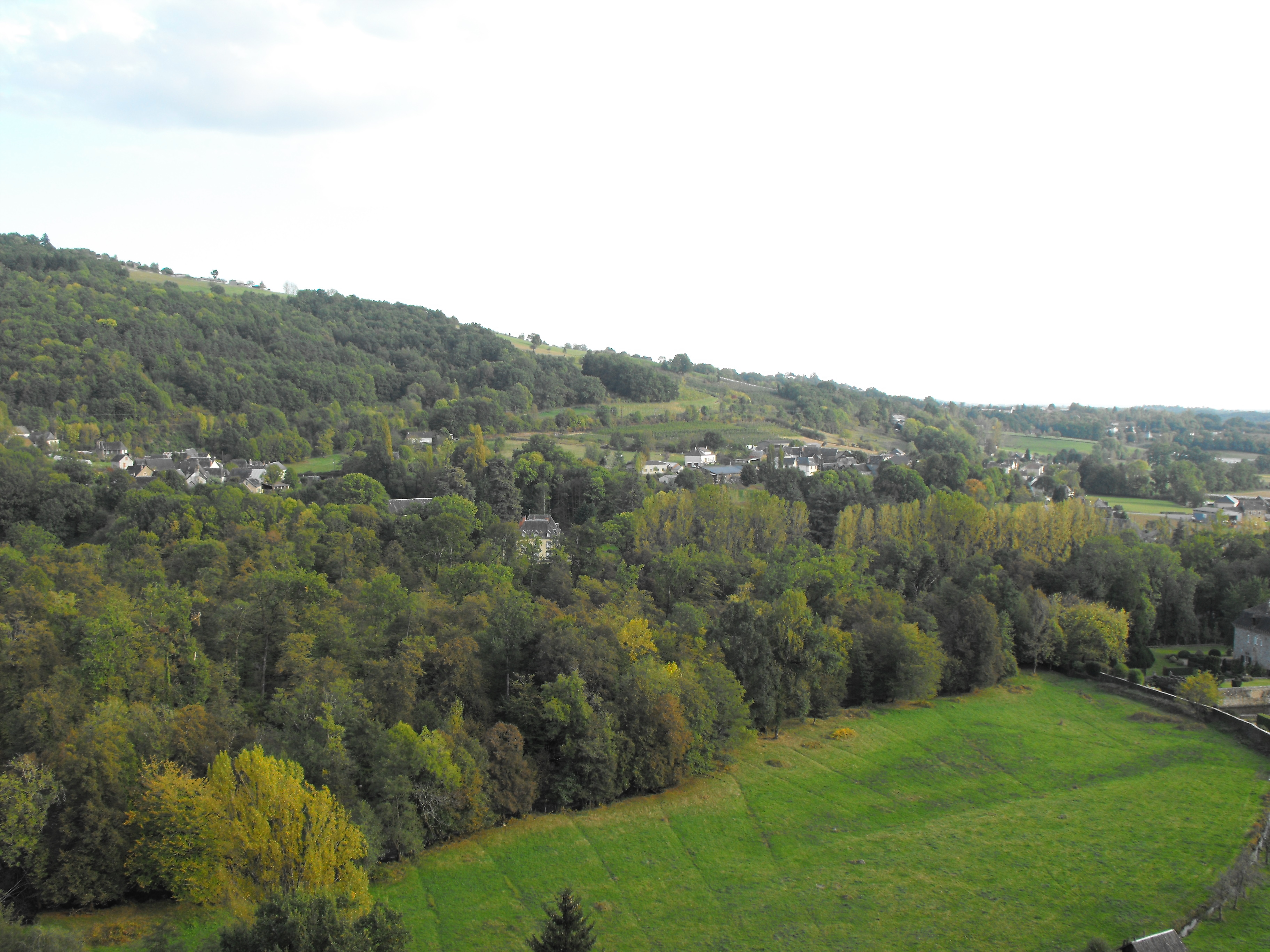 Vue d'ensemble